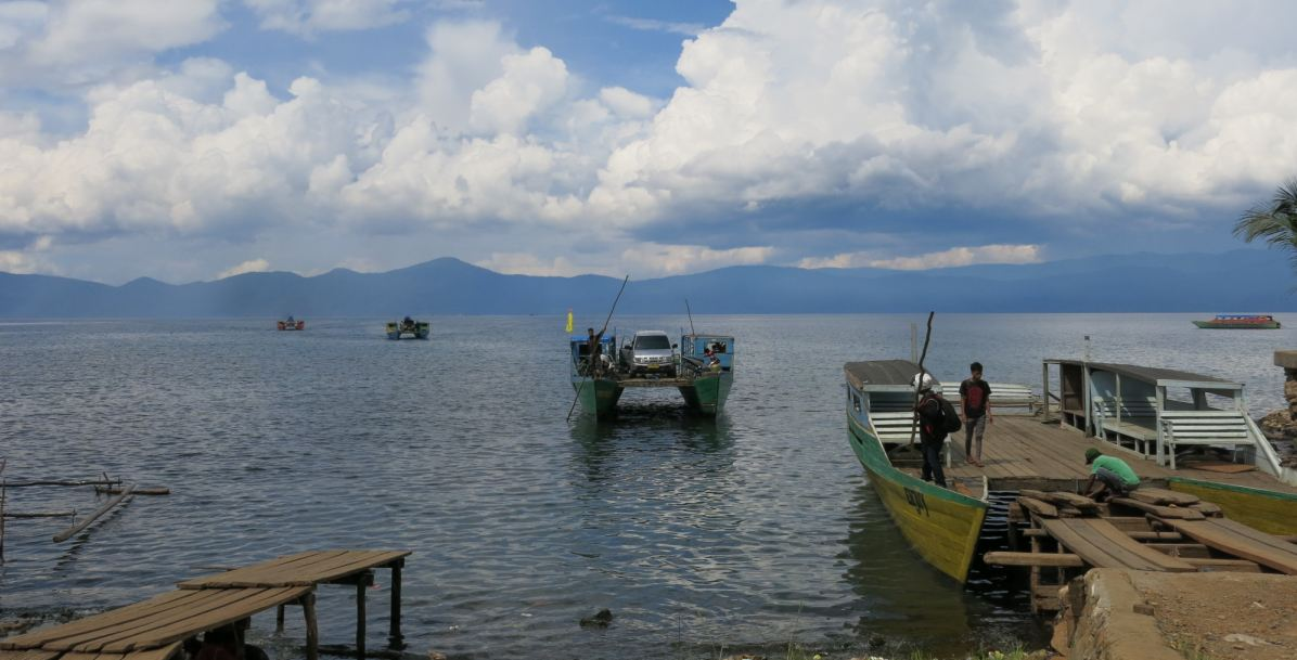 Kapal motor penyeberangan dari Nuha tiba di dermaga penyeberangan Sorowako.